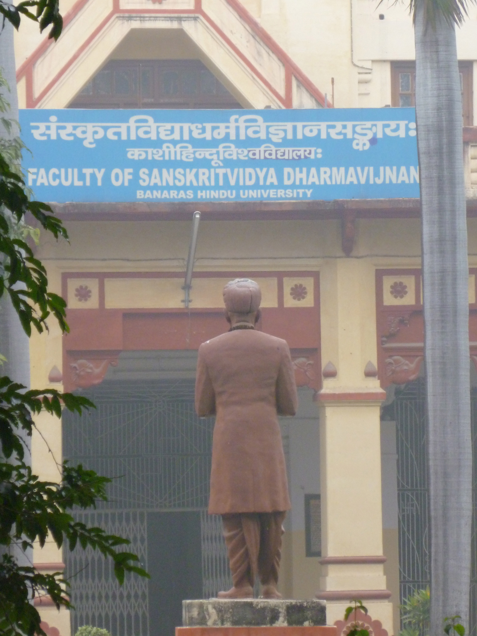 Facultad de Sánscrito